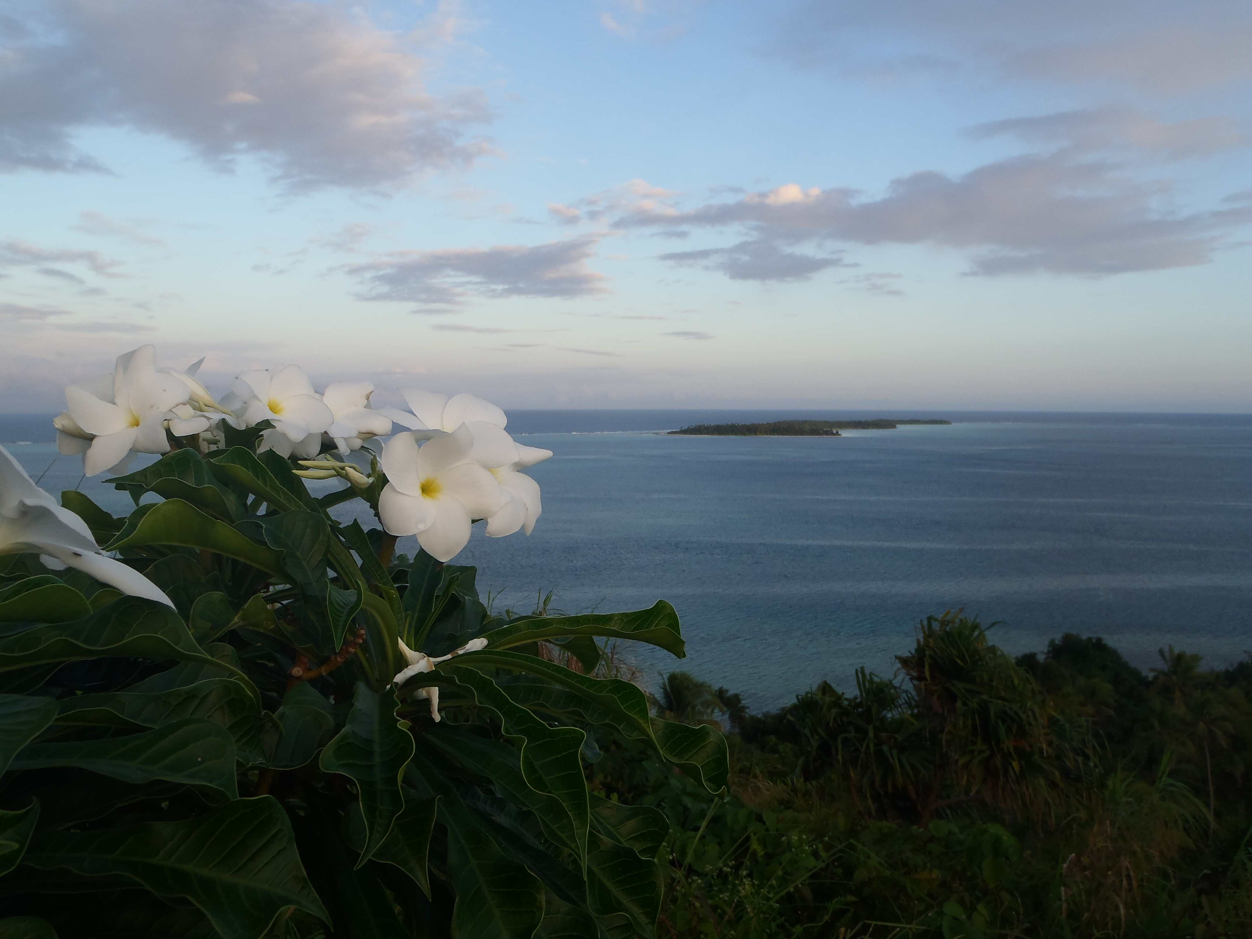 Le lagon de Wallis comprend 16 ilots magnifiques d'origine corallienne ou volcanique. L'îlot de Faioa est le plus grand îlot du lagon. Le lagon ne comporte que trois passes qui communiquent avec l'Océan, il est donc protégé par son récif barrière sur l'essentiel de son pourtour.